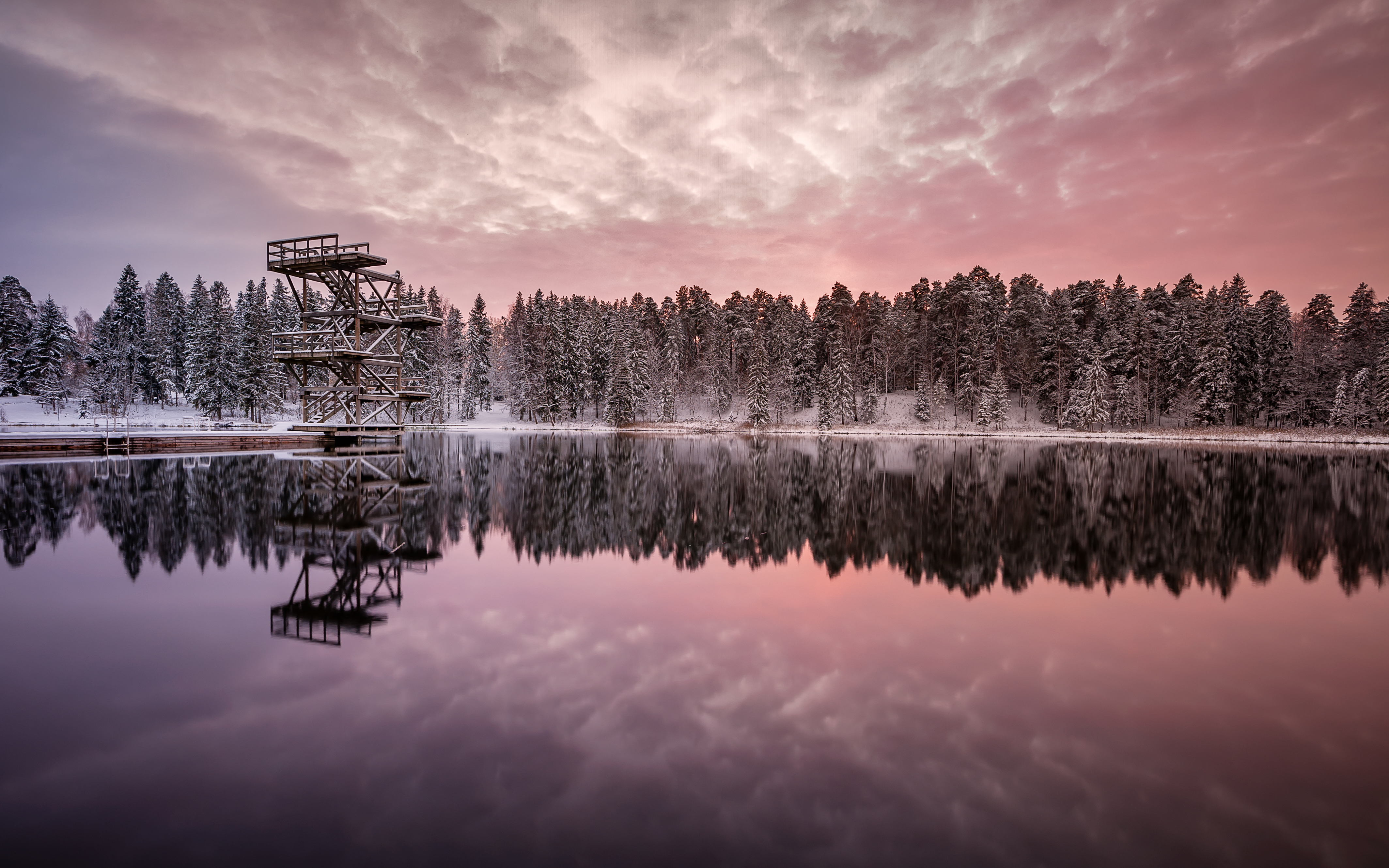 Vanamõisa lake Estonia